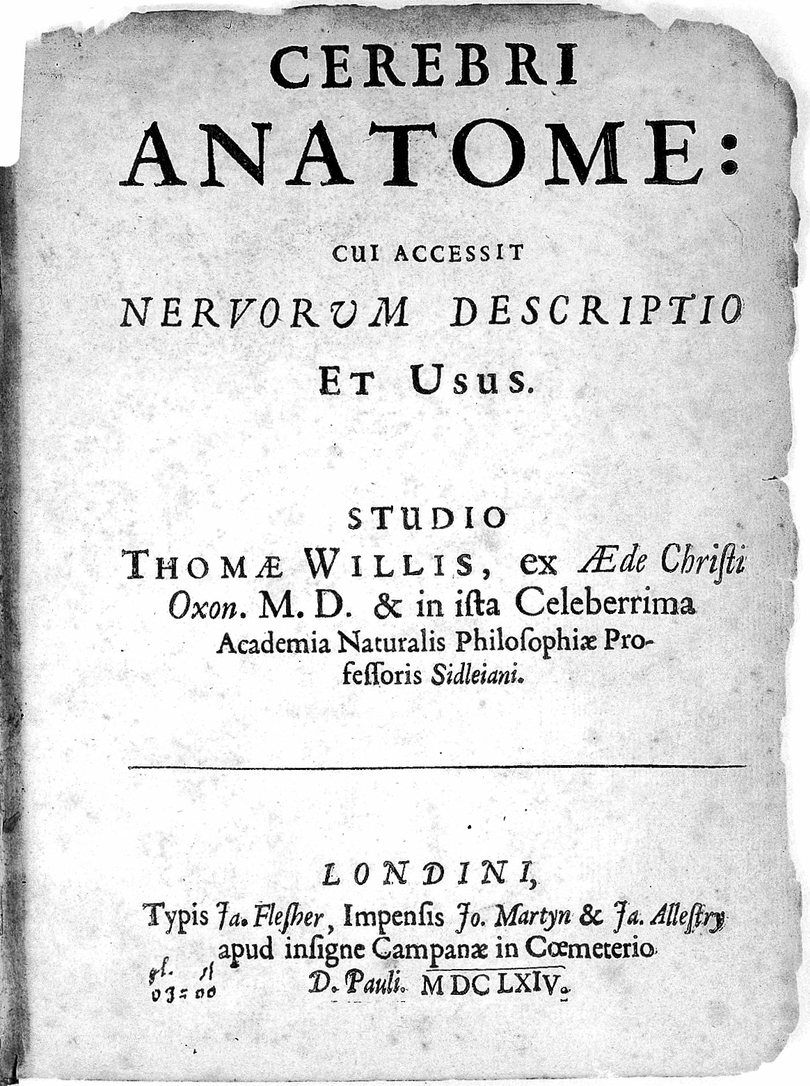 Wellcome Images